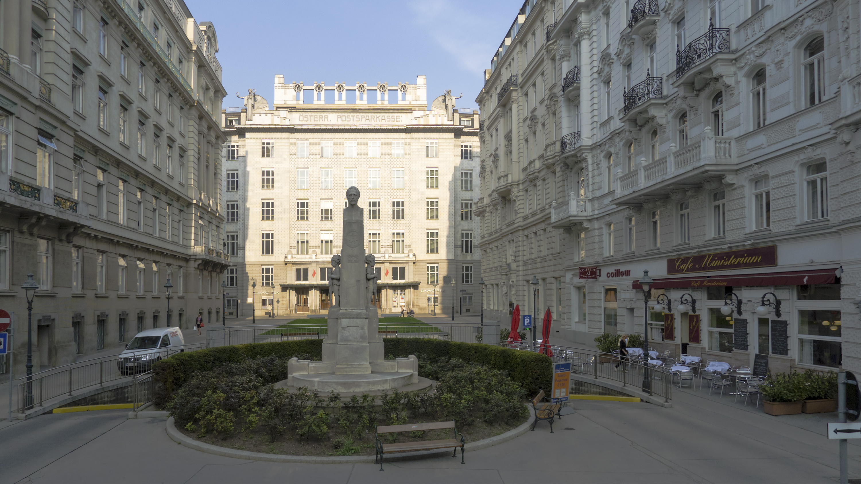 Georg-Coch-Platz in Wien 1 beim Stubenring Richtung Westen